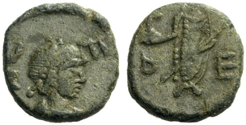 Nummus von Leo I